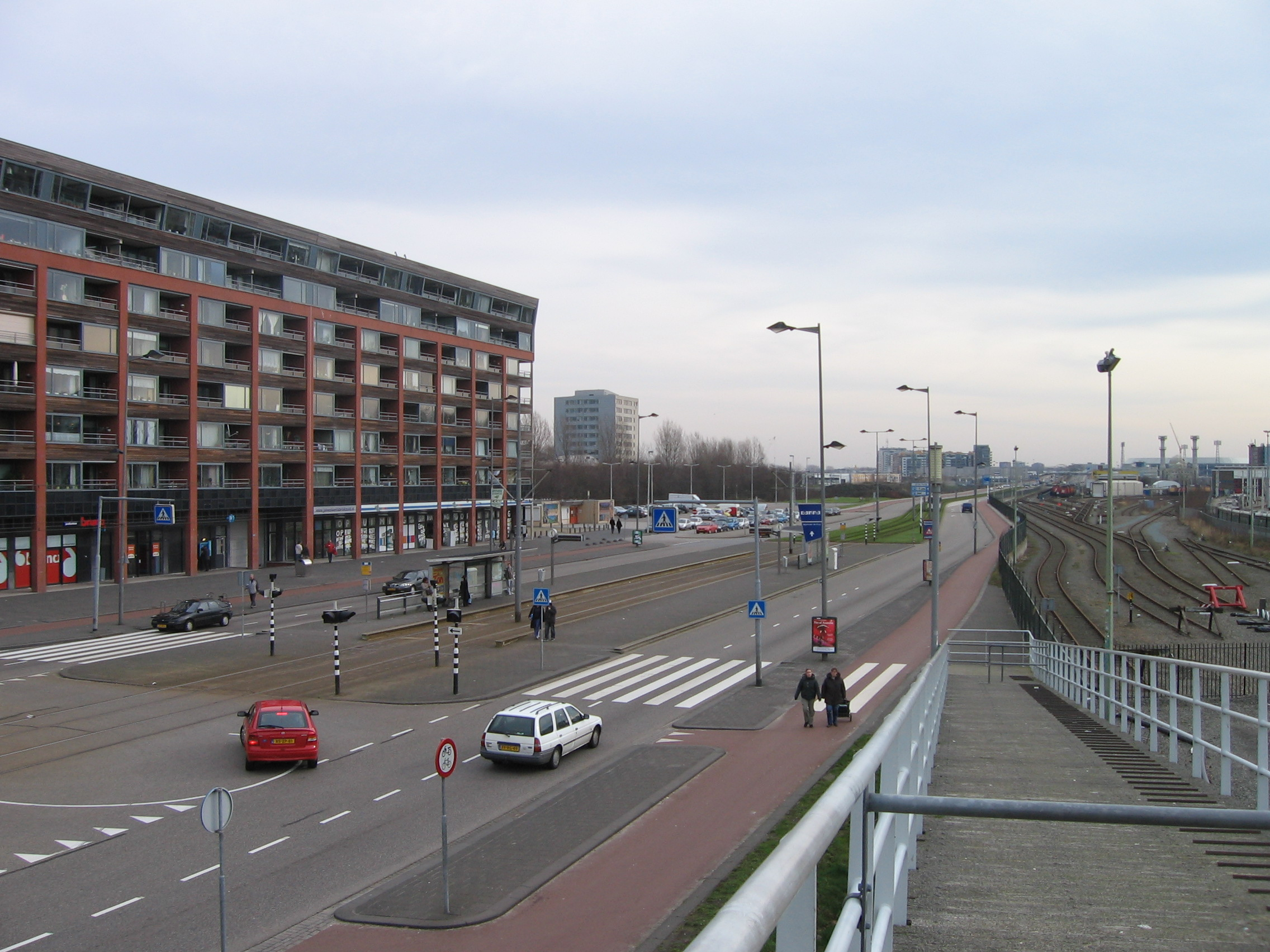 De Laan op Zuid in Rotterdam met aan de rechterkant de RET-remise Hilledijk.